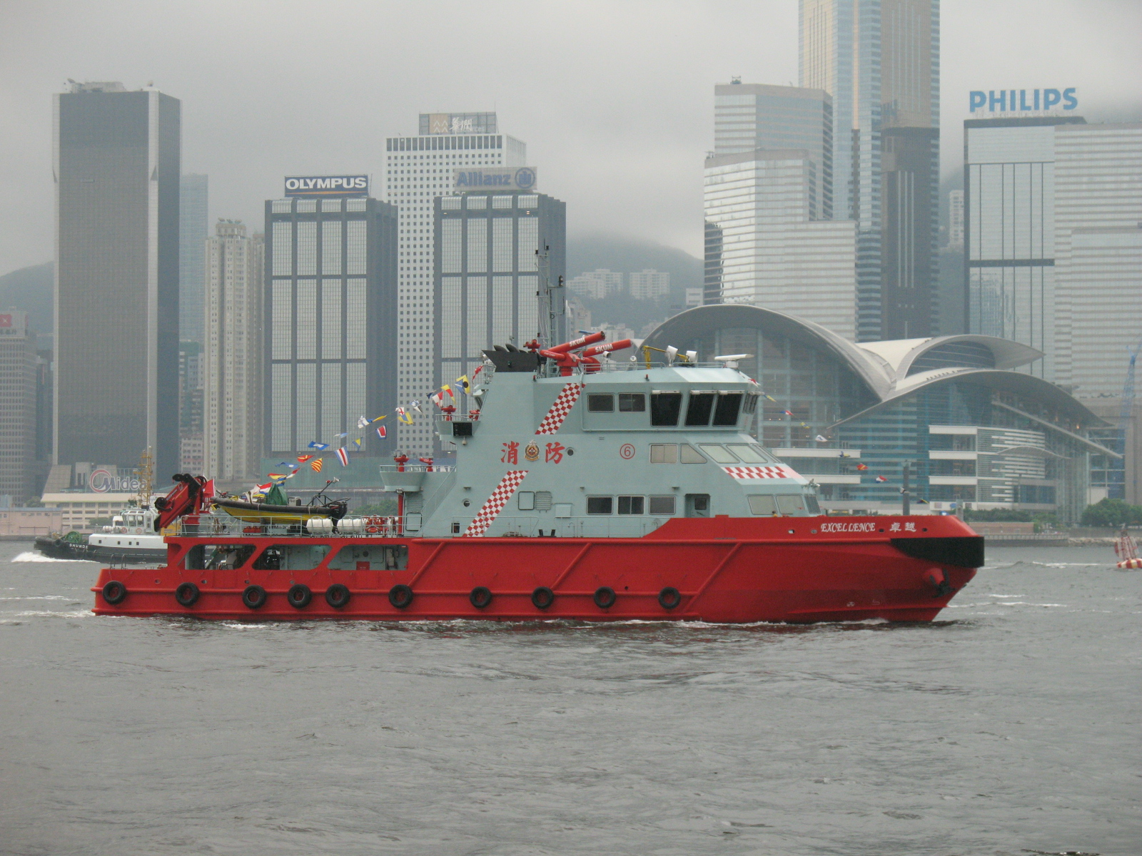 中文（香港）: 繼精英號滅火輪後，另一艘最新大型姊妹滅火輪「卓越號」於2005年3月服役。